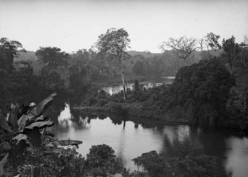 Kamerun, Dimbamba Dimbamba.- Blick auf Dimbamba 26.12.1903